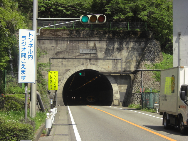 国道20号・新笹子トンネルの大月市側坑口